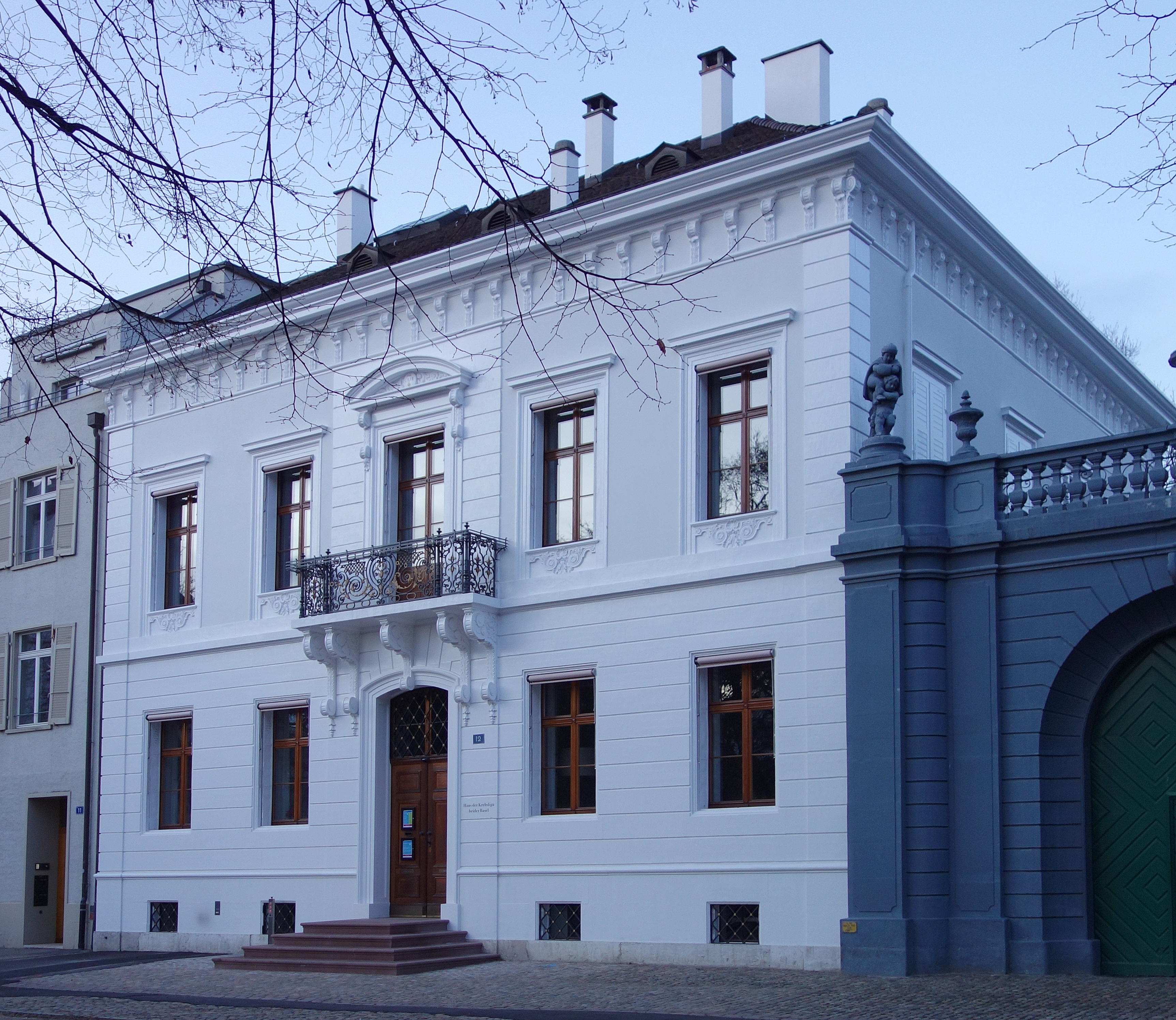 Villa